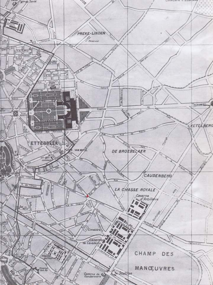 plan d'etterbeek en 1898